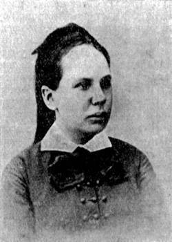 Ljubov’ Ivanovna Kornilova Serdjukova (1852-1892)